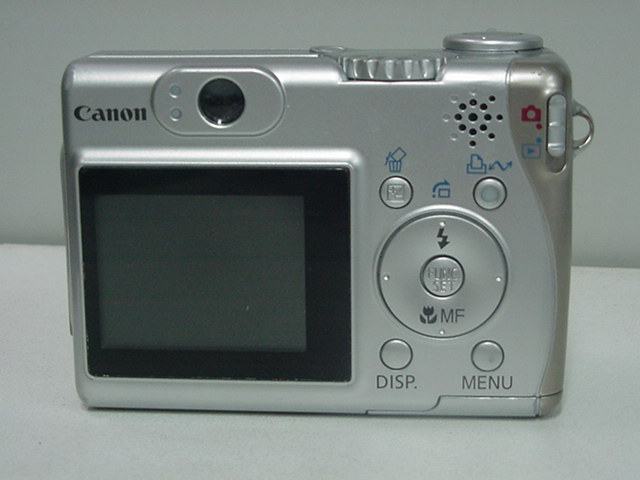 Appareil photographique numérique Canon PowerShot A530 - Vue arrière